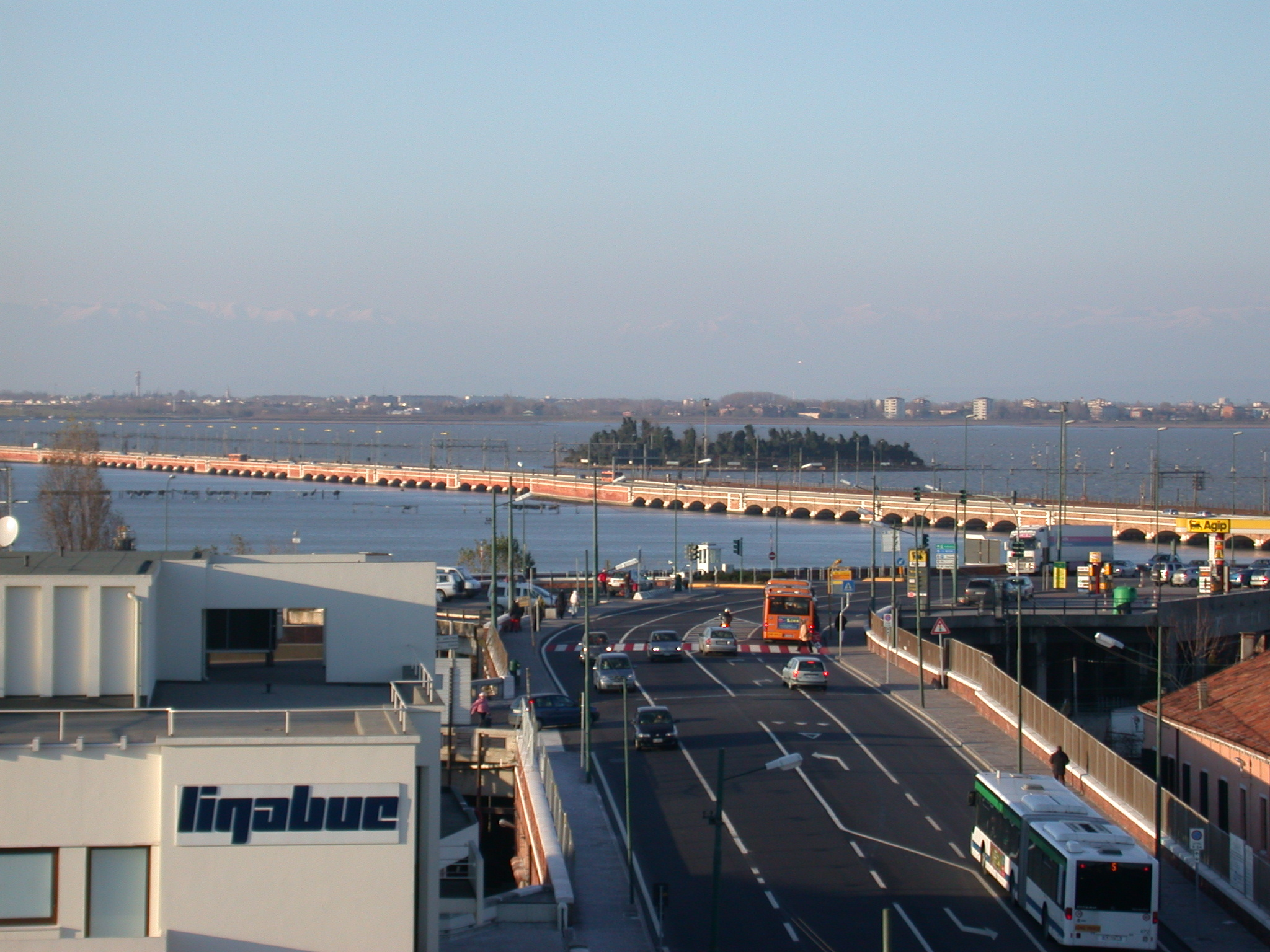 Venezia - Ponte della libertà - collega Venezia alla terraferma